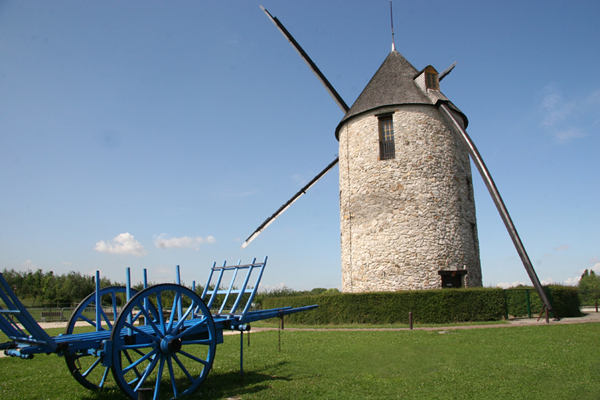 Moulin de Montfermeil toujours en activité.